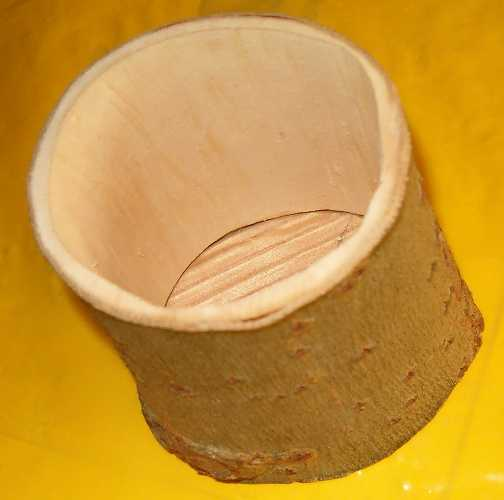 Grendåse: ofte anvendt emne i grøn sløjd; et stykke frisk afskåret gren udhules, og med en "grendåsehøvl" (særlig krøshøvl) laves en indvendig rille til bund; når emnet tørrer, trækker det sig sammen, så den indsatte bund kommer til at sidde helt fast. Først bores hul gennem grenstykket, så snittes hullet færdig med snittekniv; bunden skæres omhyggeligt til for at passe mest mulig nøjagtigt ind i krøsgangen (rillen til bund).